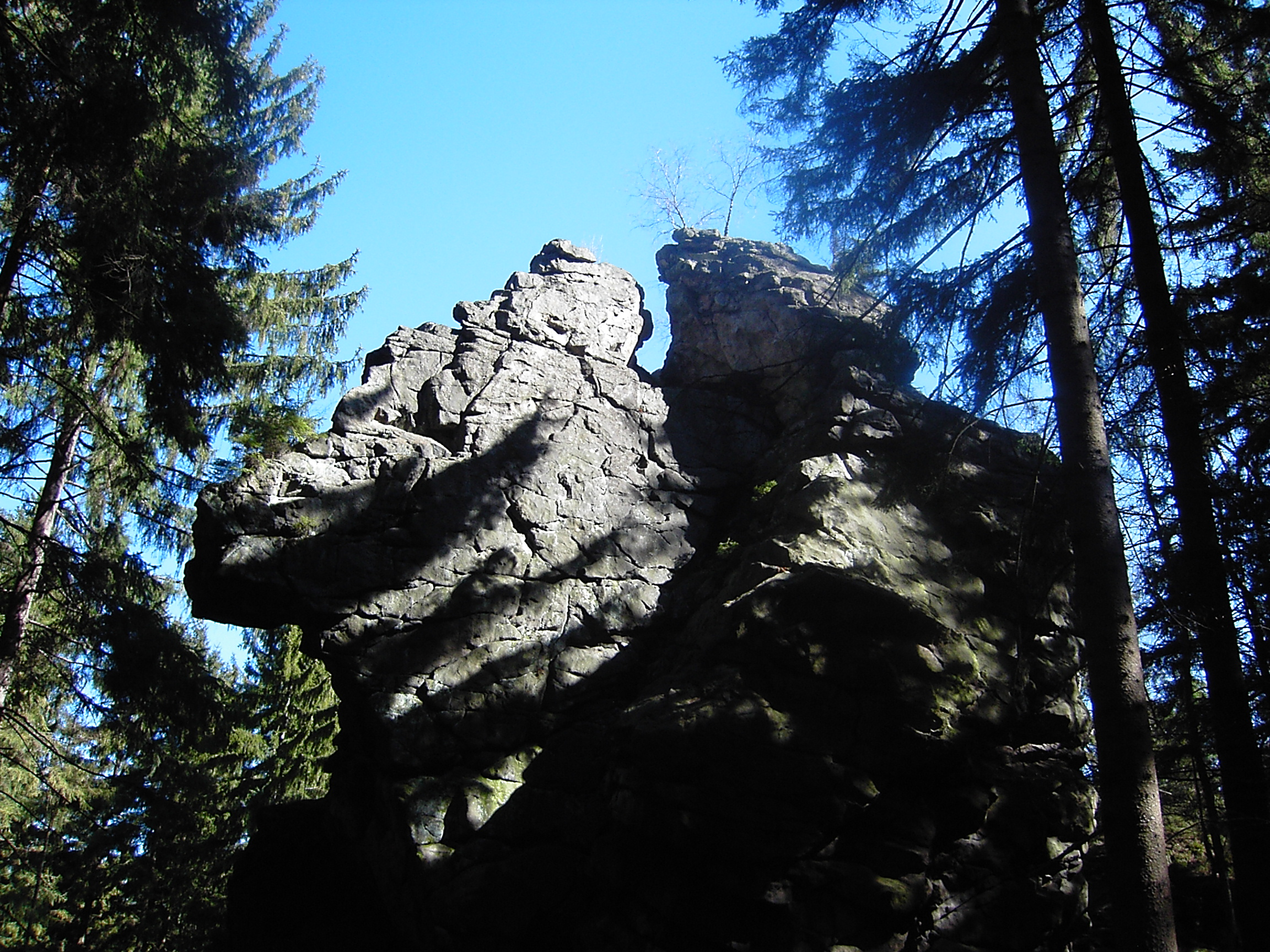 Rybenské perníčky